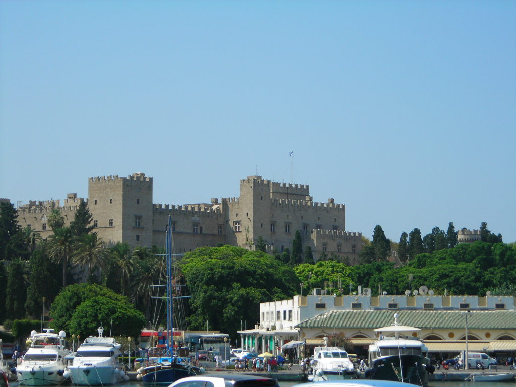 Rodi (città)